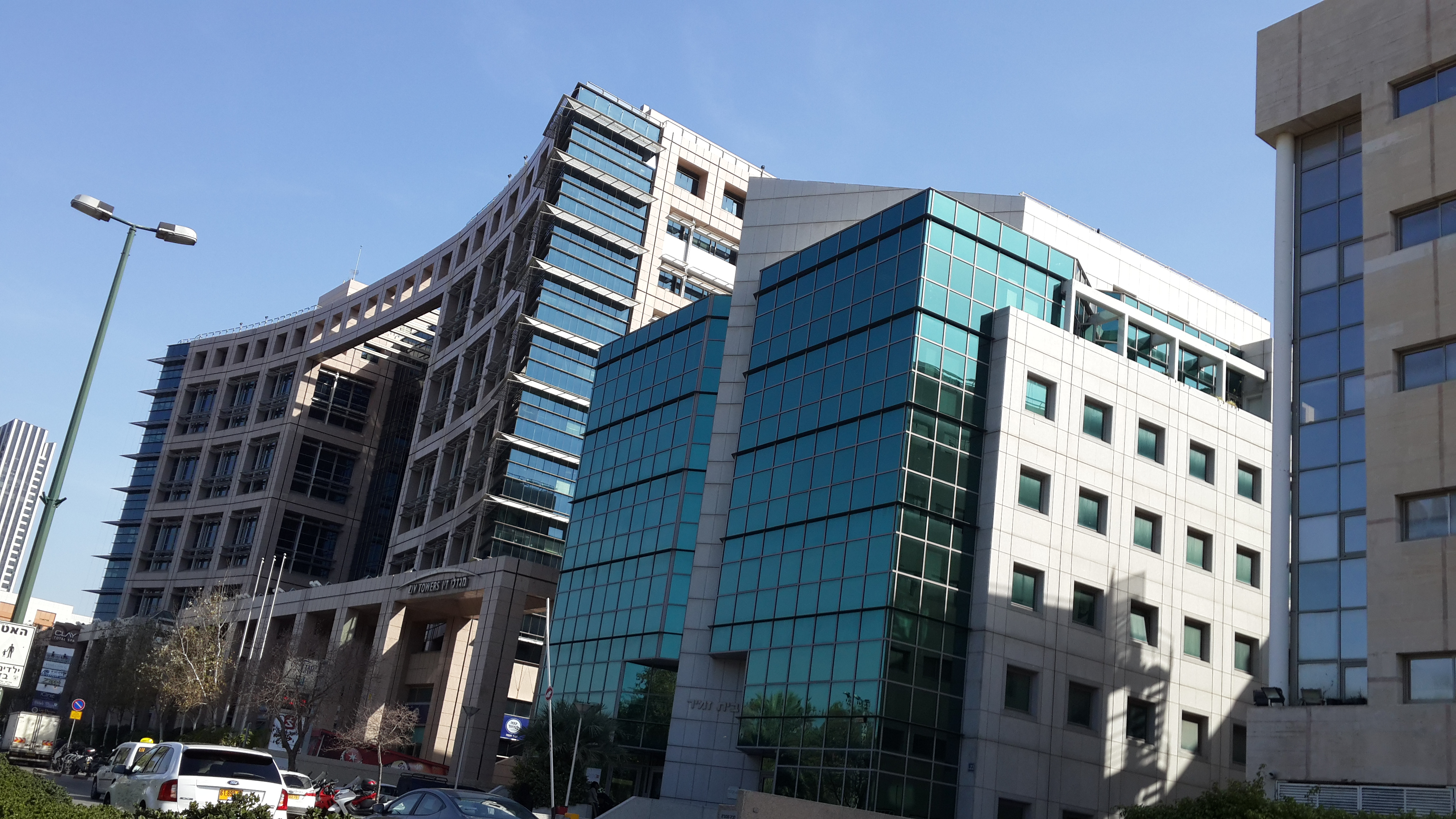 Рамат хаХаяль днём